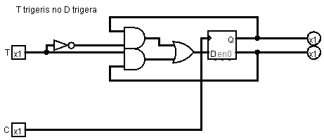 RStoD